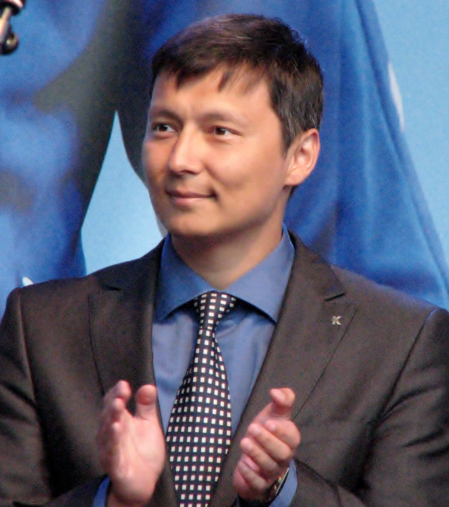 Mihhail Kõlvart Londoni olümpiamedalistide tervituspeol